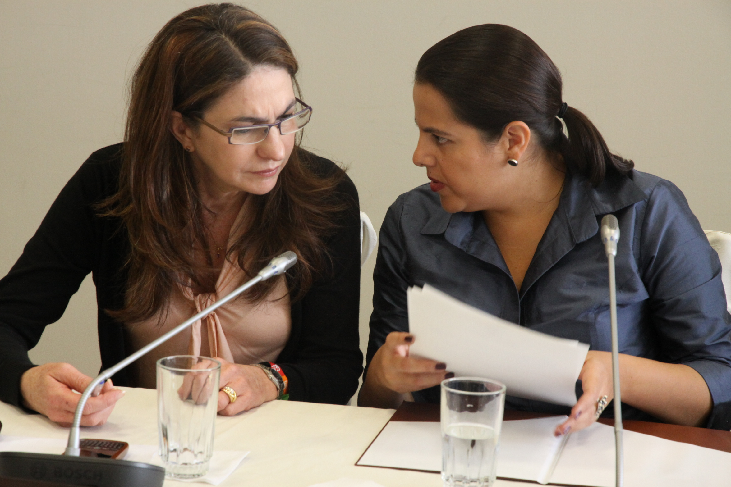 9 de Marzo de 2010